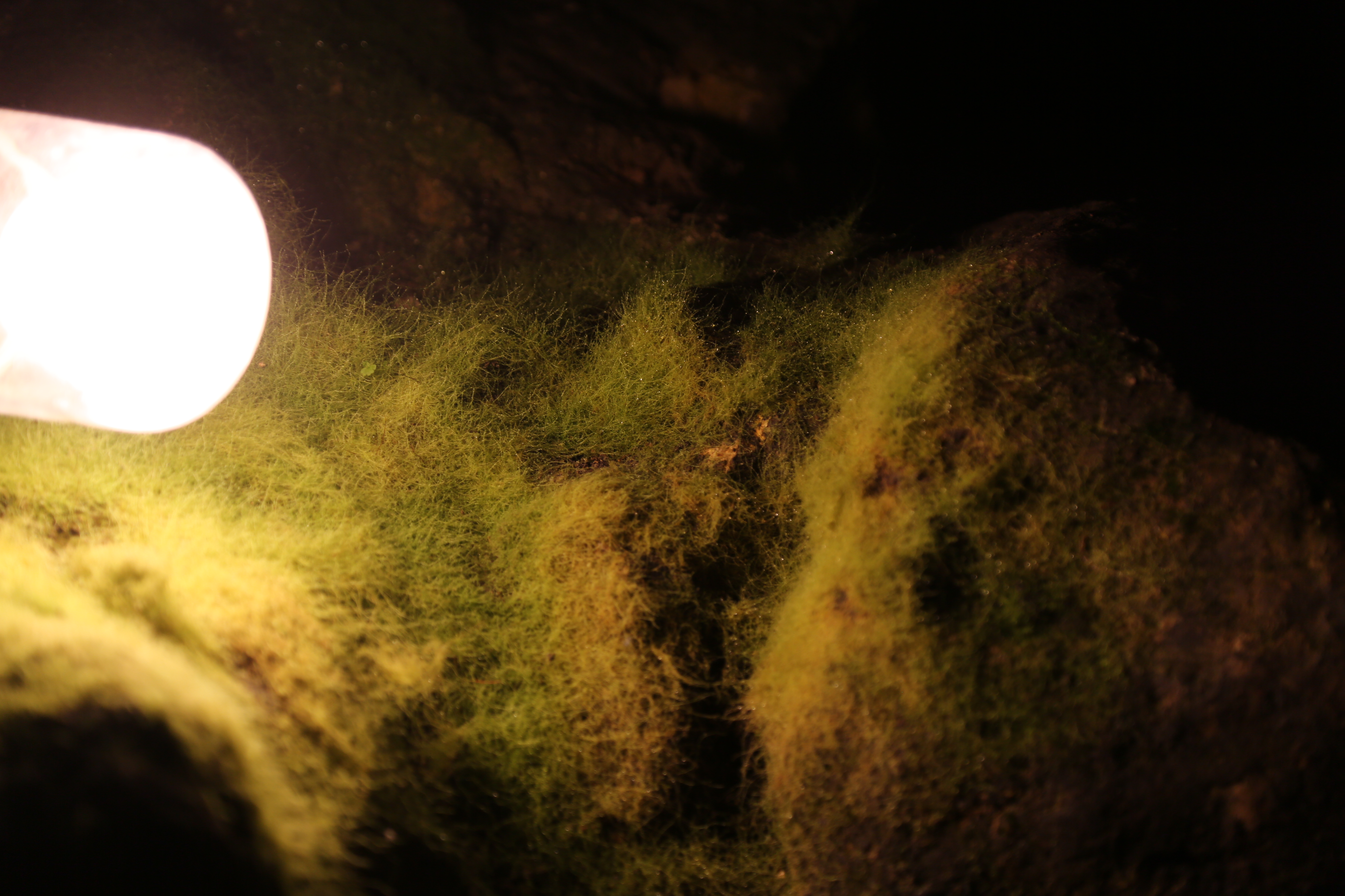 Höhle Hohler Fels bei Schelklingen, Alb-Donau-Kreis. Die Höhle ist eine von sechs Höhlen im UNESCO-Welterbe Höhlen und Eiszeitkunst der Schwäbischen Alb. In der Höhle wurde die älteste Figur der Menschheitsgeschichte gefunden. Lampenflore in der Höhle.